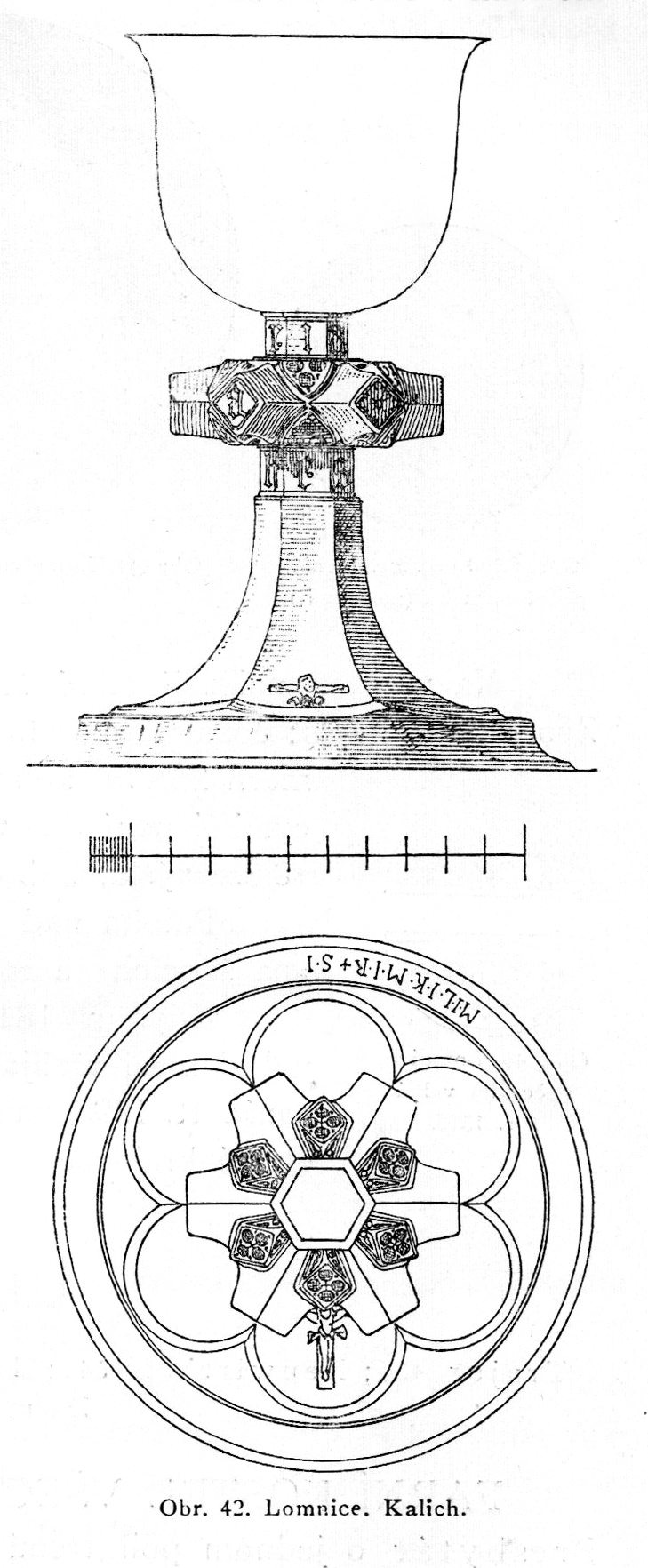 kostsel sv. václava lomnice kalich